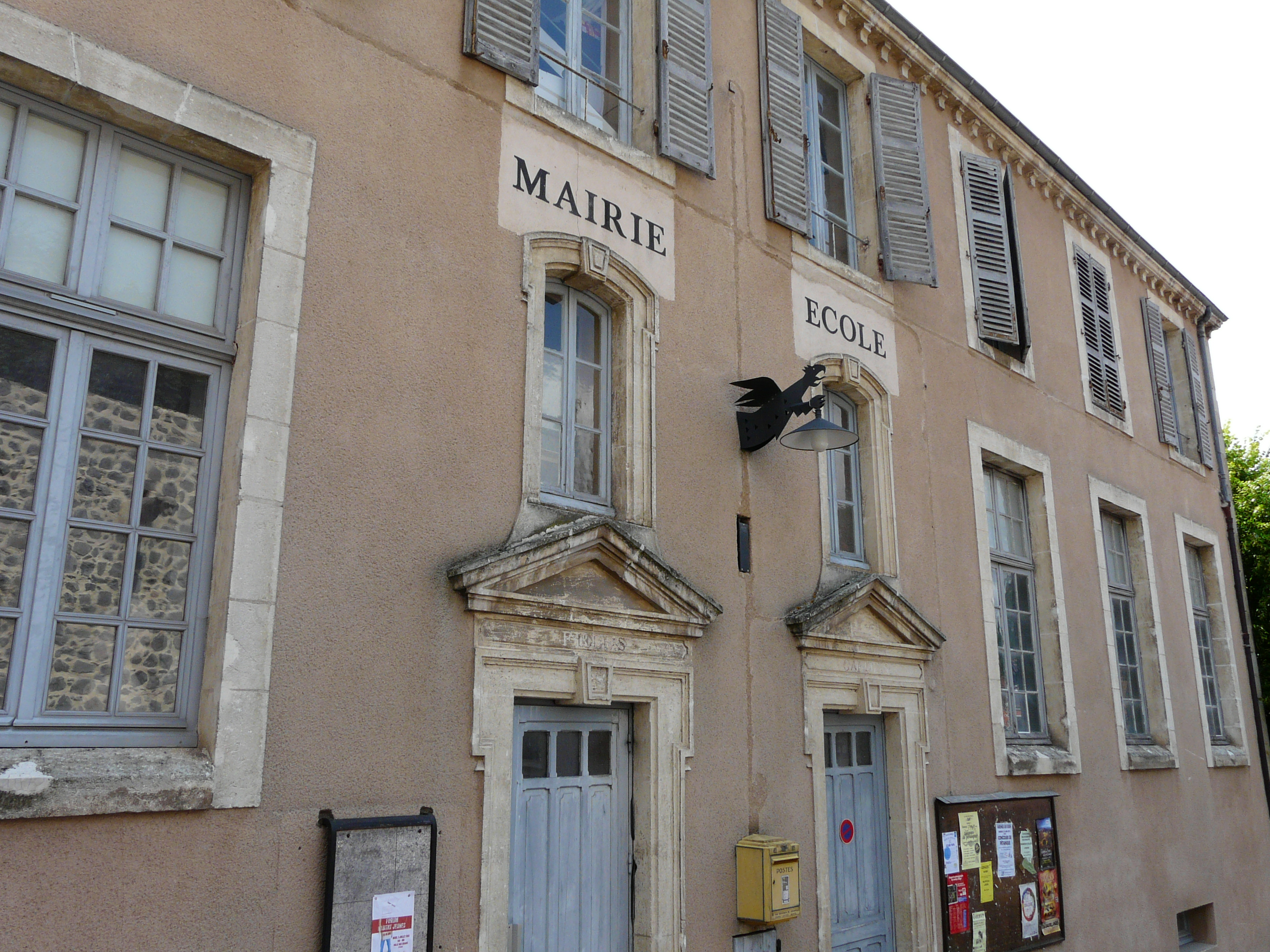 Mairie d'Usson, Puy-de-Dôme, France.